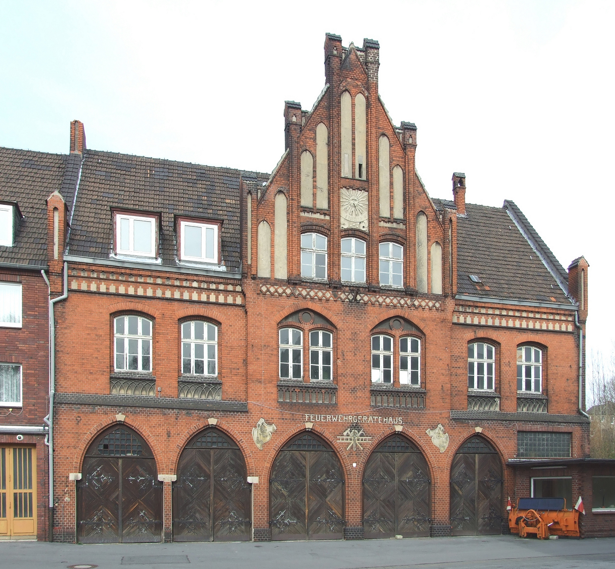 Herne, Stöckstraße 34 b, Vorderfront